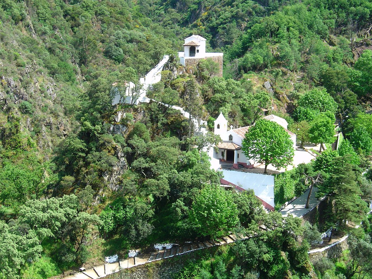 Sra. da Piedade - Lousã - Portugal